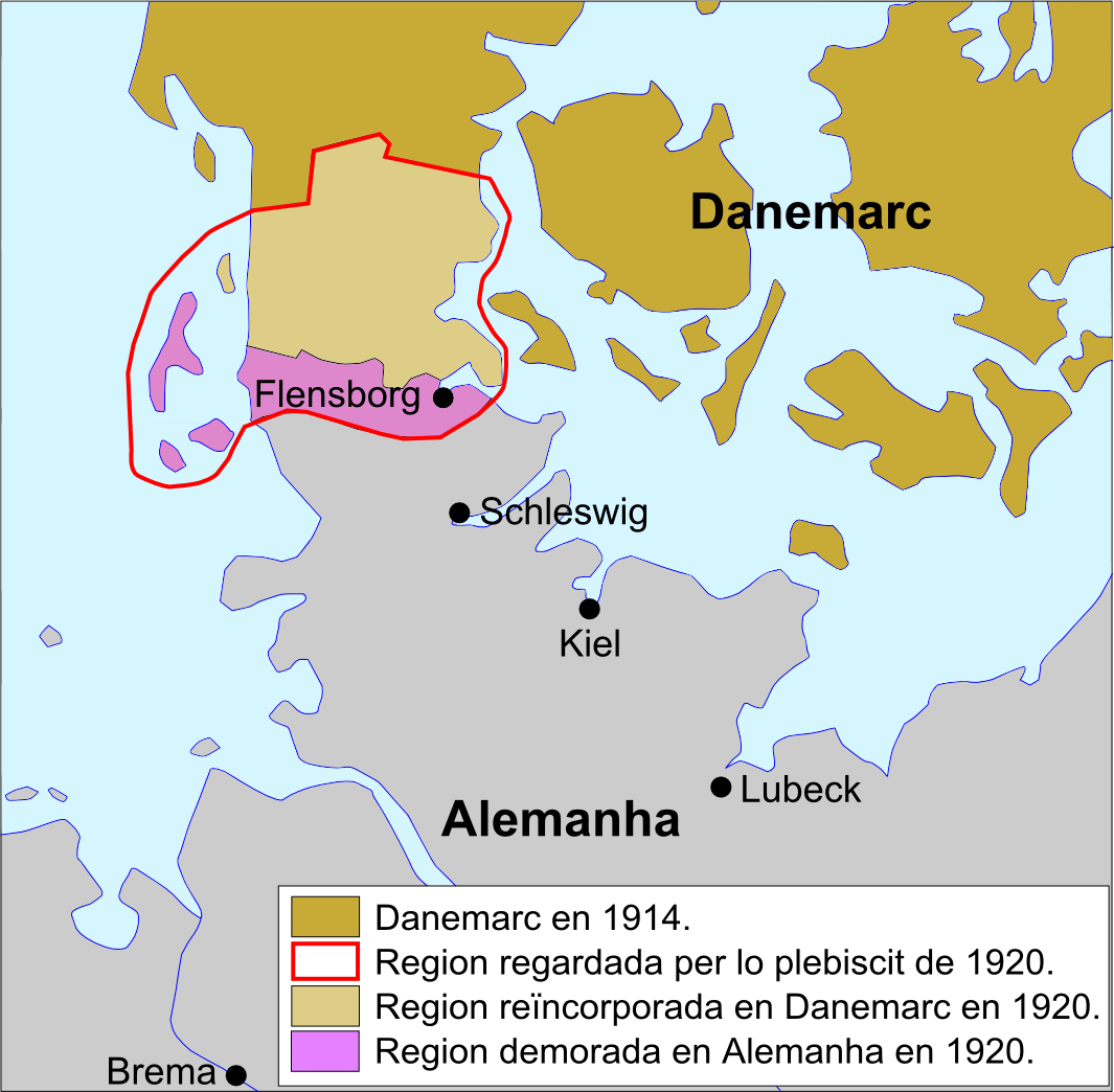 Modificacion territòriala de Danemarc après lo plebiscit de 1920.